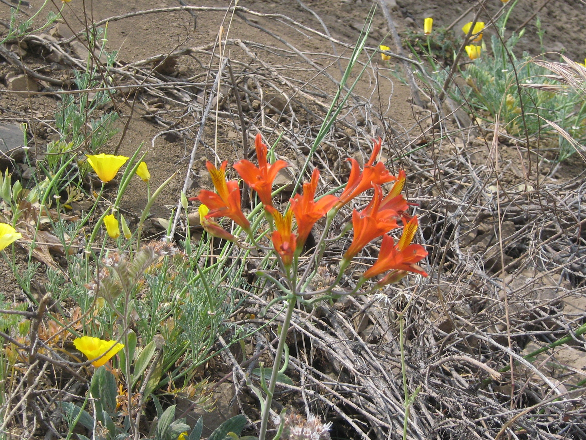 Alstroemeria ligtu, 1200 masl, Central Chile